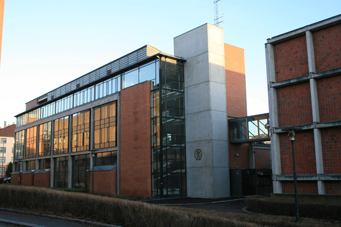 Politihøgskolen (Police Academy) in Oslo